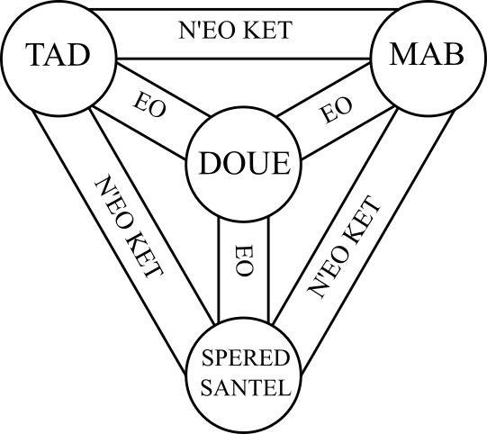 Savet diwar , krouet gant AnonMoos.